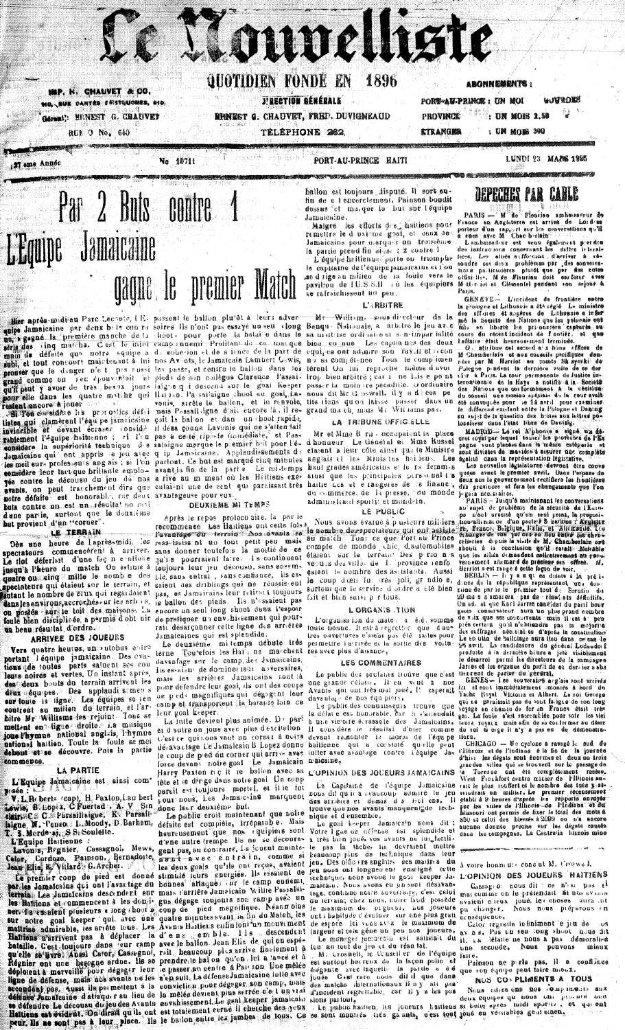 Une du quotidien haïtien Le Nouvelliste du 23 mars 1925